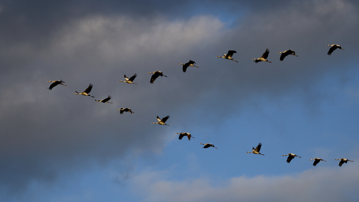 V-Formation von Kranichen in Mecklenburg